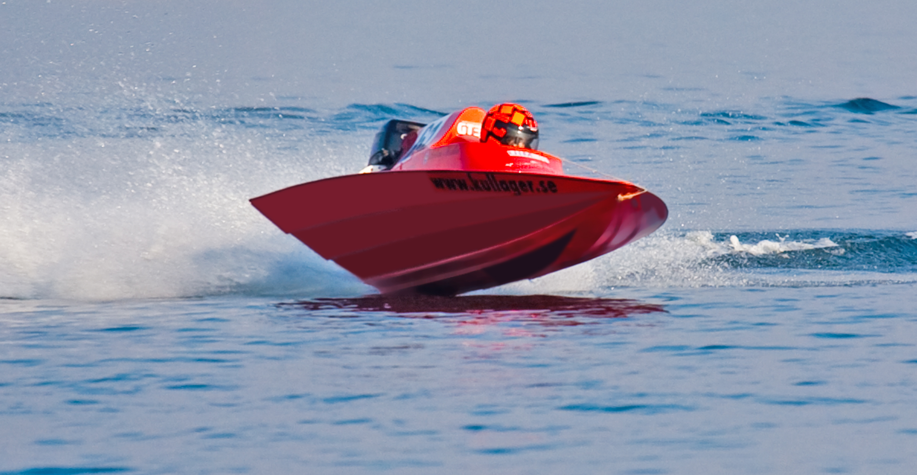 Vaxholmsloppet 2010